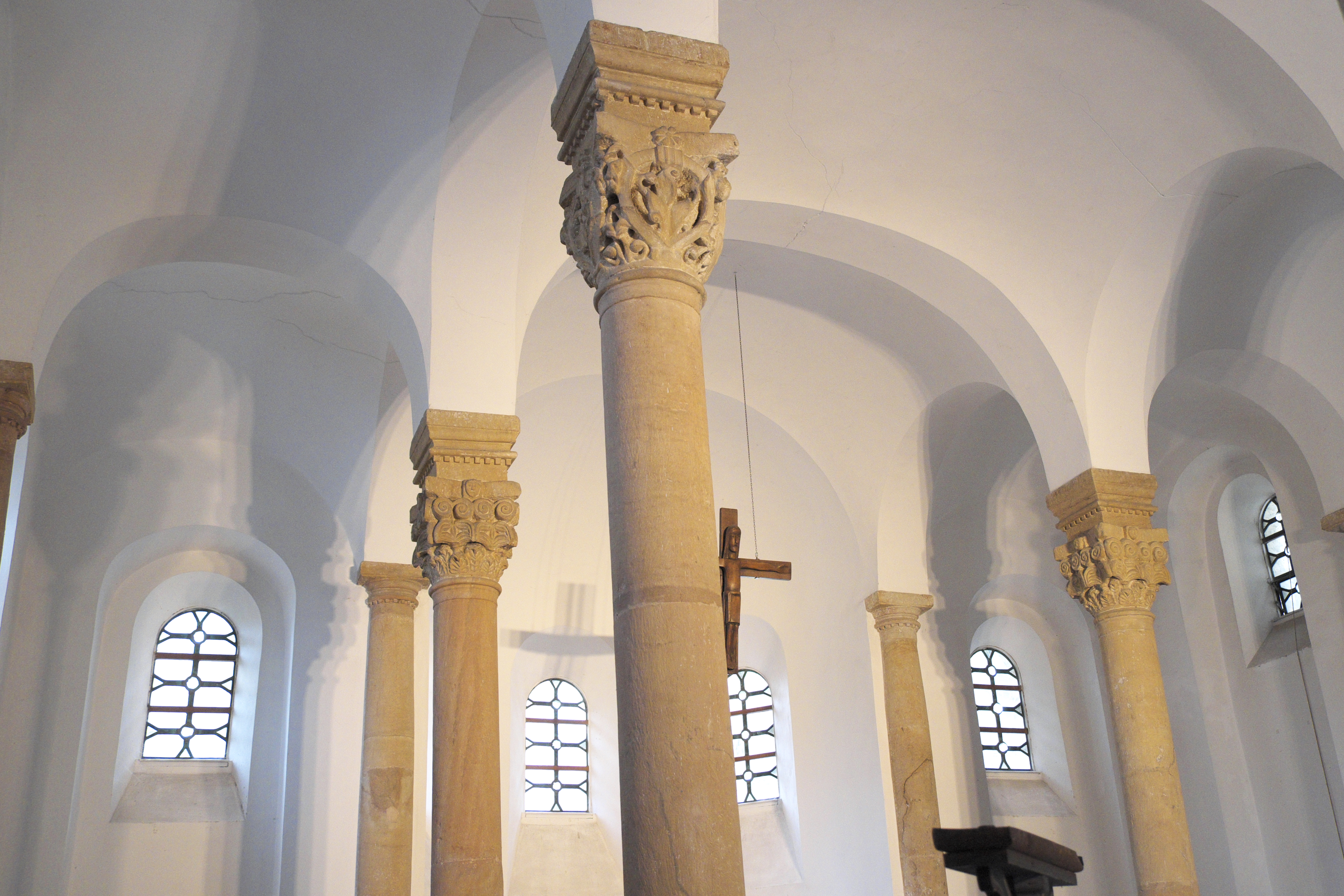 Bartholomäuskapelle in Paderborn (Nordrhein-Westfalen), Hängekuppeln